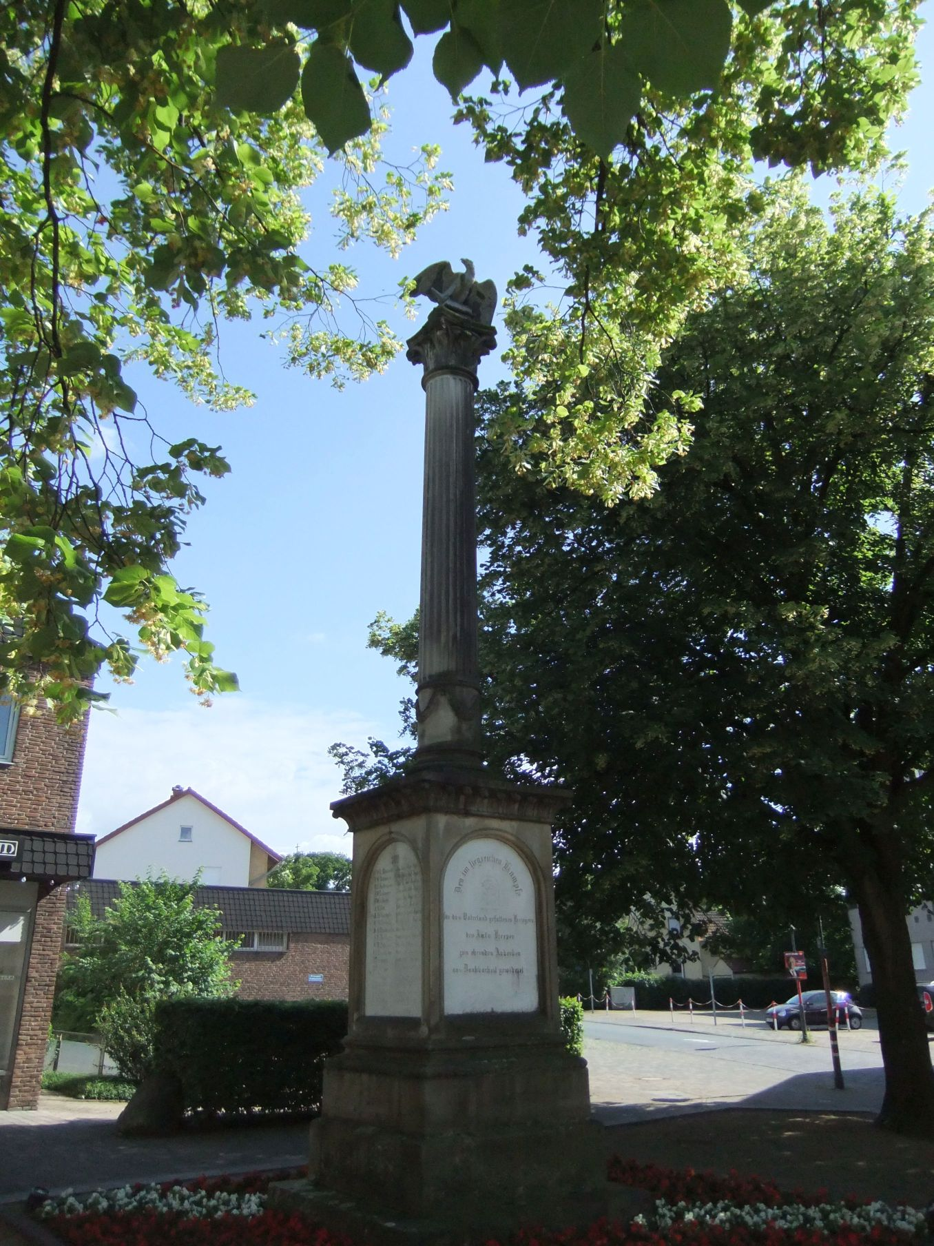 Kriegerdenkmal im Bielefelder Stadtteil Heepen. Erinnerung an die sogenannten Einigungskriege 1864-1871.